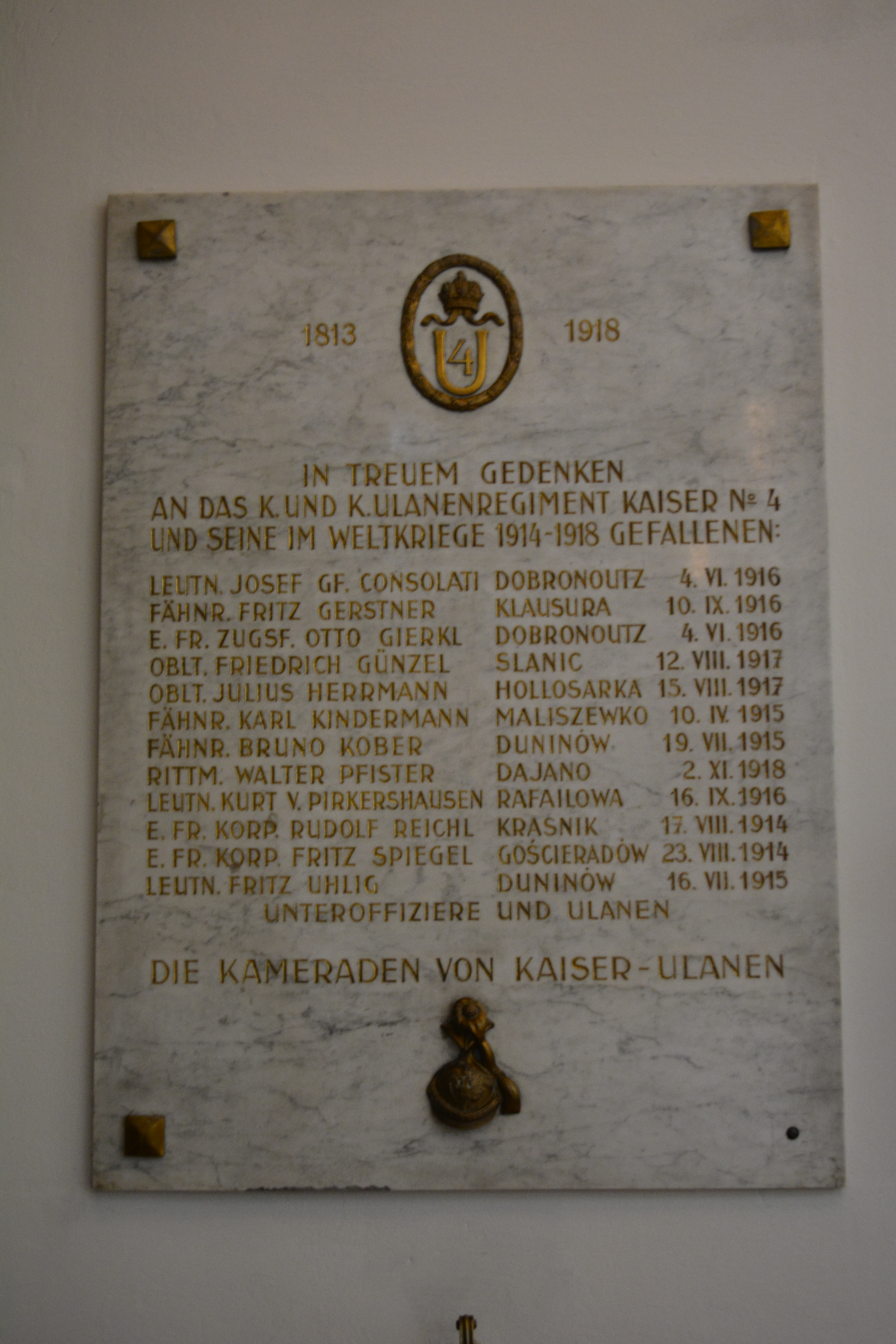 Gedenktafel für das k.u.k. Ulanenregiment Nr. 4 (Wien, Neuer Markt, Kapuzinerkirche)